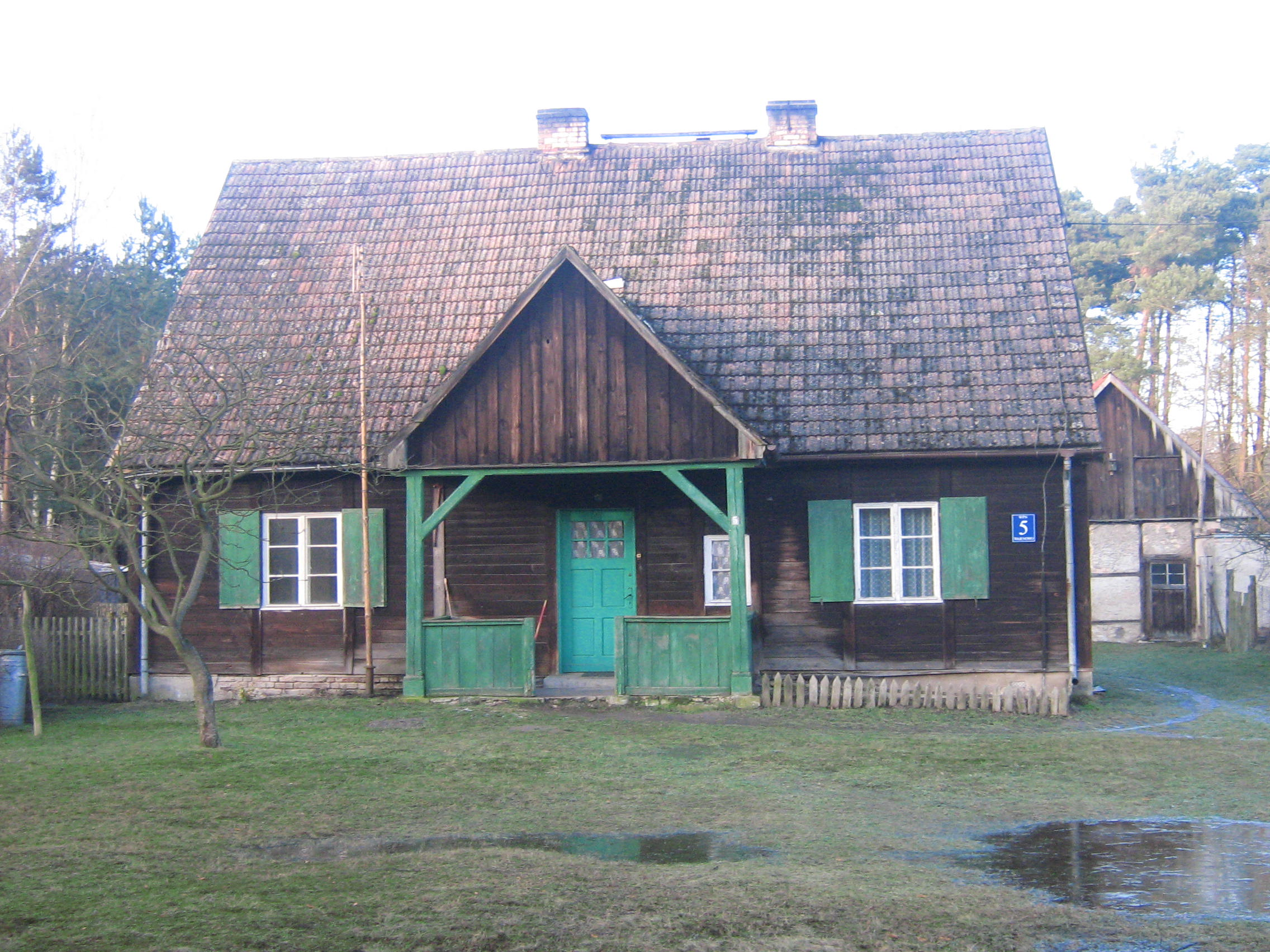 Zabytkowy drewniany dom o numerze 5 w Warnowie